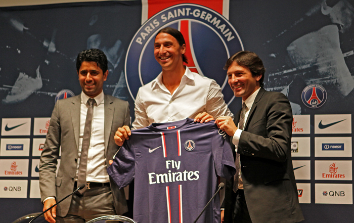 conference de presse au Parc des Princes a Paris pour la presentation de la nouvelle star du PSG, Zlatan Ibrahimovic, en presence du President Nasser al Khelaifi et du Directeur sportif Leonardo.